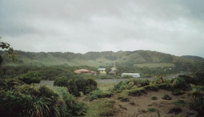 Vista parcial del poblado de Chanquín, Parque Nacional de Chiloé, Isla Chiloé, Chile